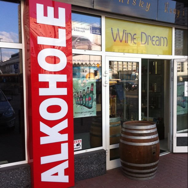 Marchand de vin en Ologne